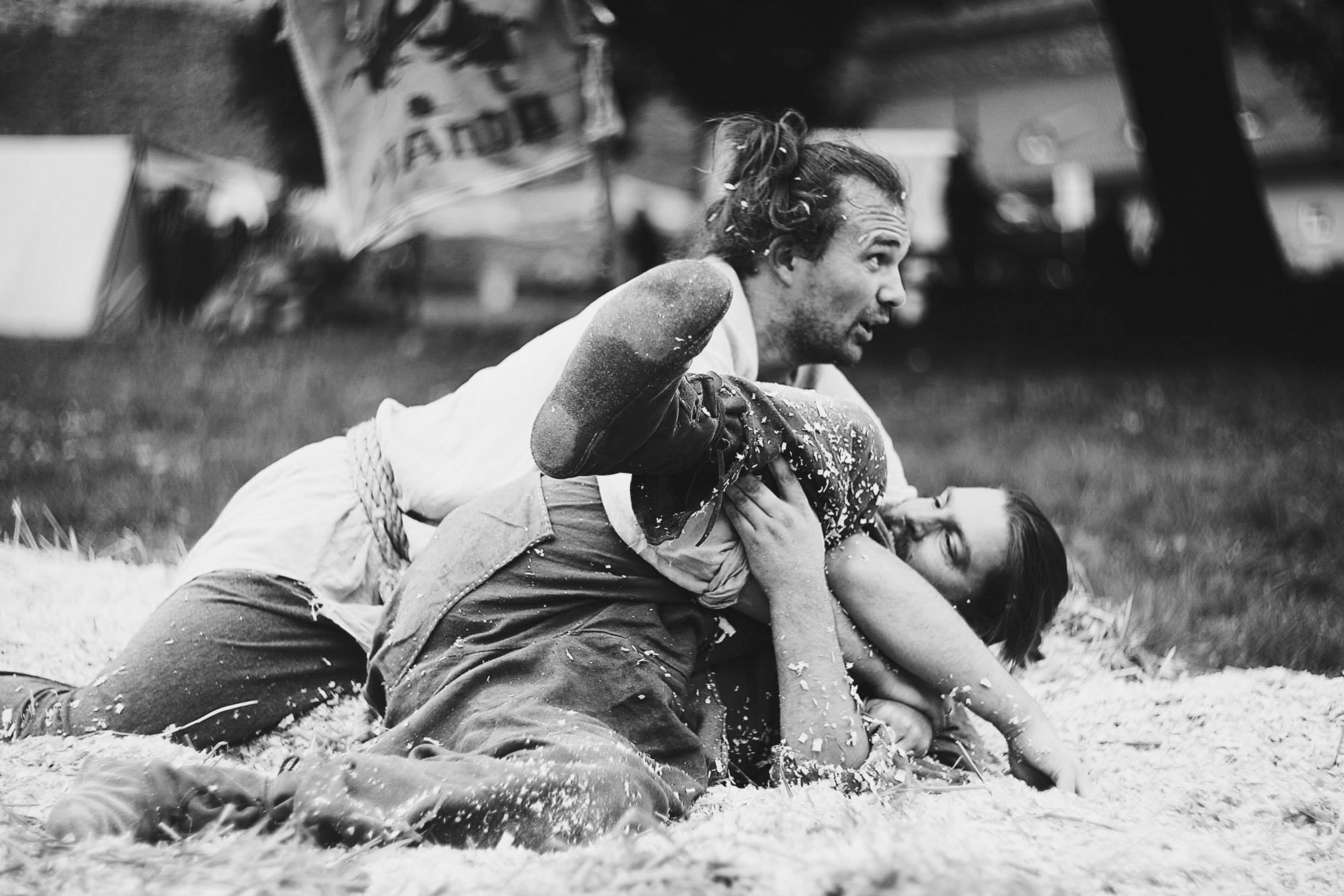 Parodomoji kova istorinės rekonstrukcijos festivalio metu 2013 09 21